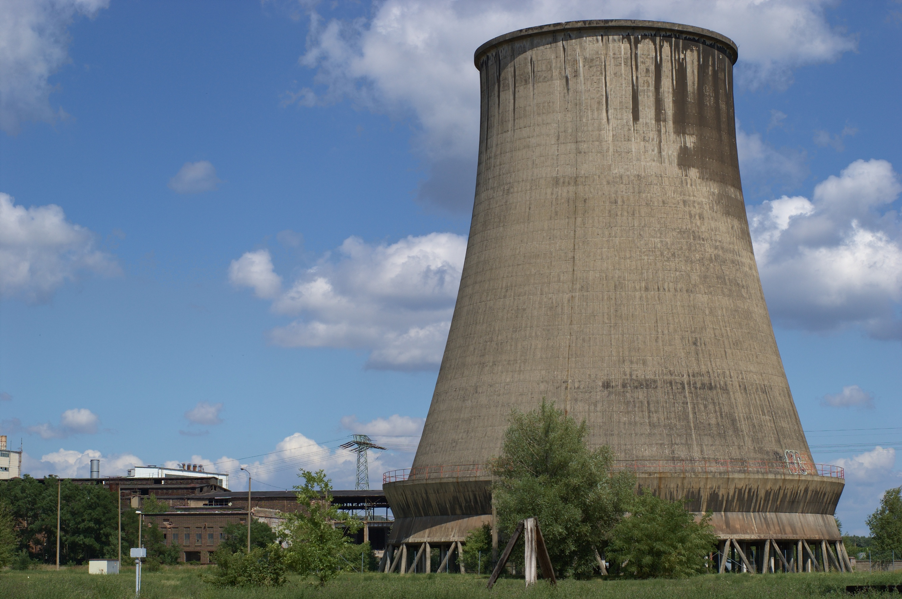 industrial museum Zschornewitz, Saxony-Anhalt, Germany / Industriedenkmal Kraftwerk Zschornewitz, Sachsen-Anhalt